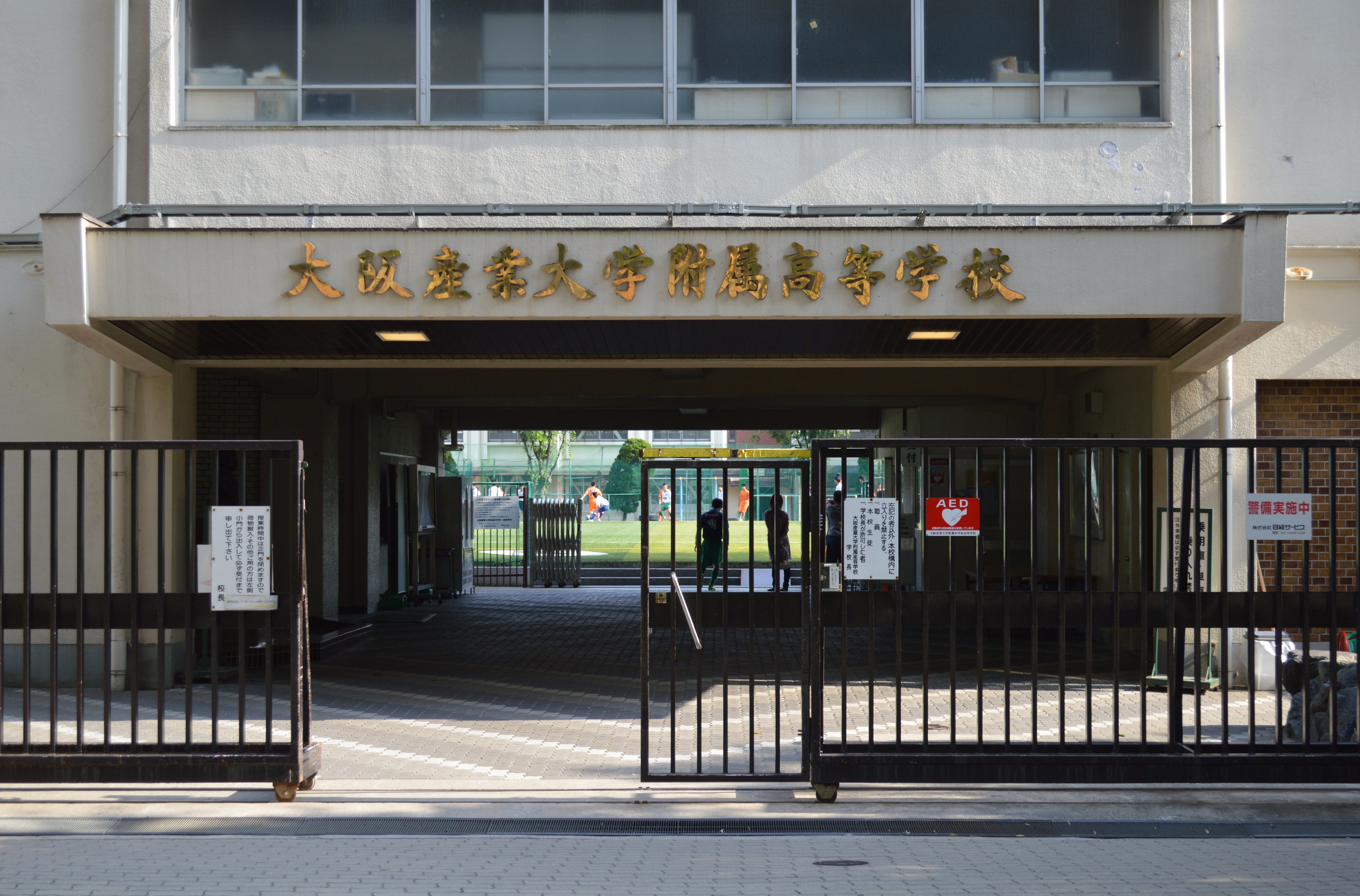 大阪市城東区古市 大阪産業大学付属中学校・高等学校